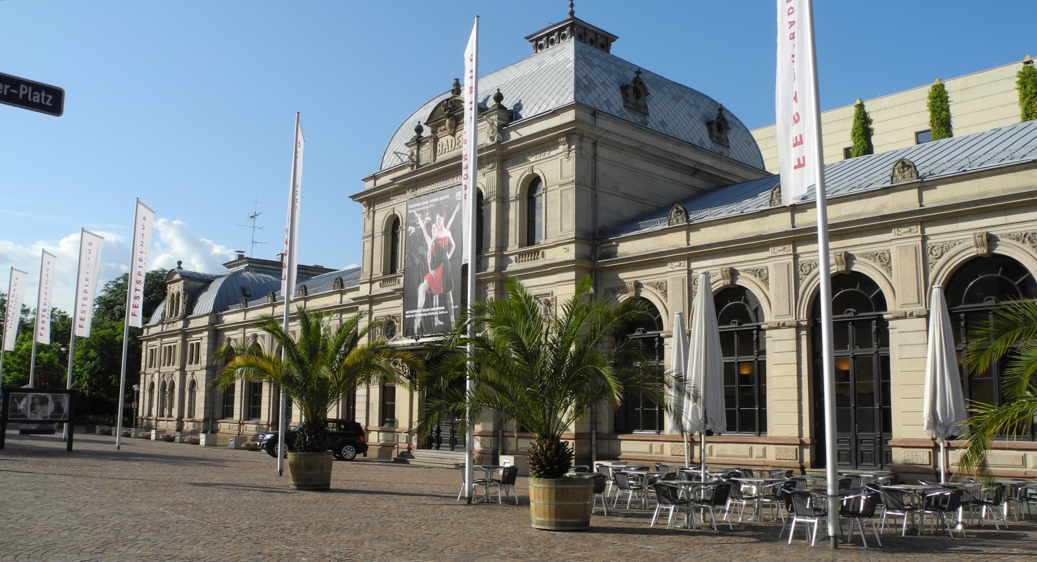 Baden-Baden - Festspielhaus am Ernst-Schlapper-Platz